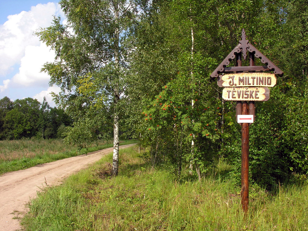 Ramoniškė, Mažeikių raj., Viekšnių seniūnija Režisieriaus Juozo Miltinio tėviškė Foto: Algirdas, 2006 m. rugpjūčio 15 d., Lietuva